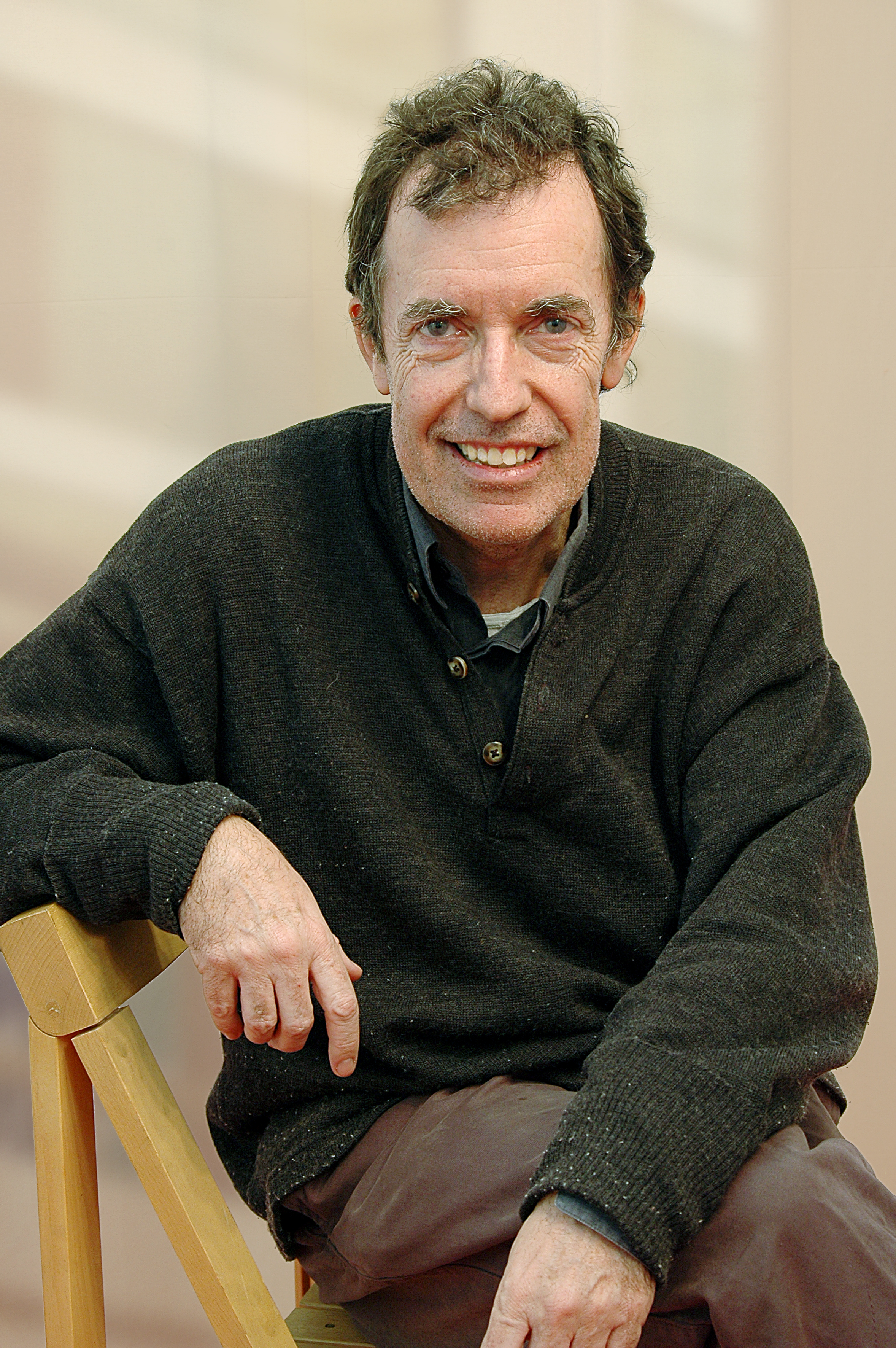 Miquel de Palol